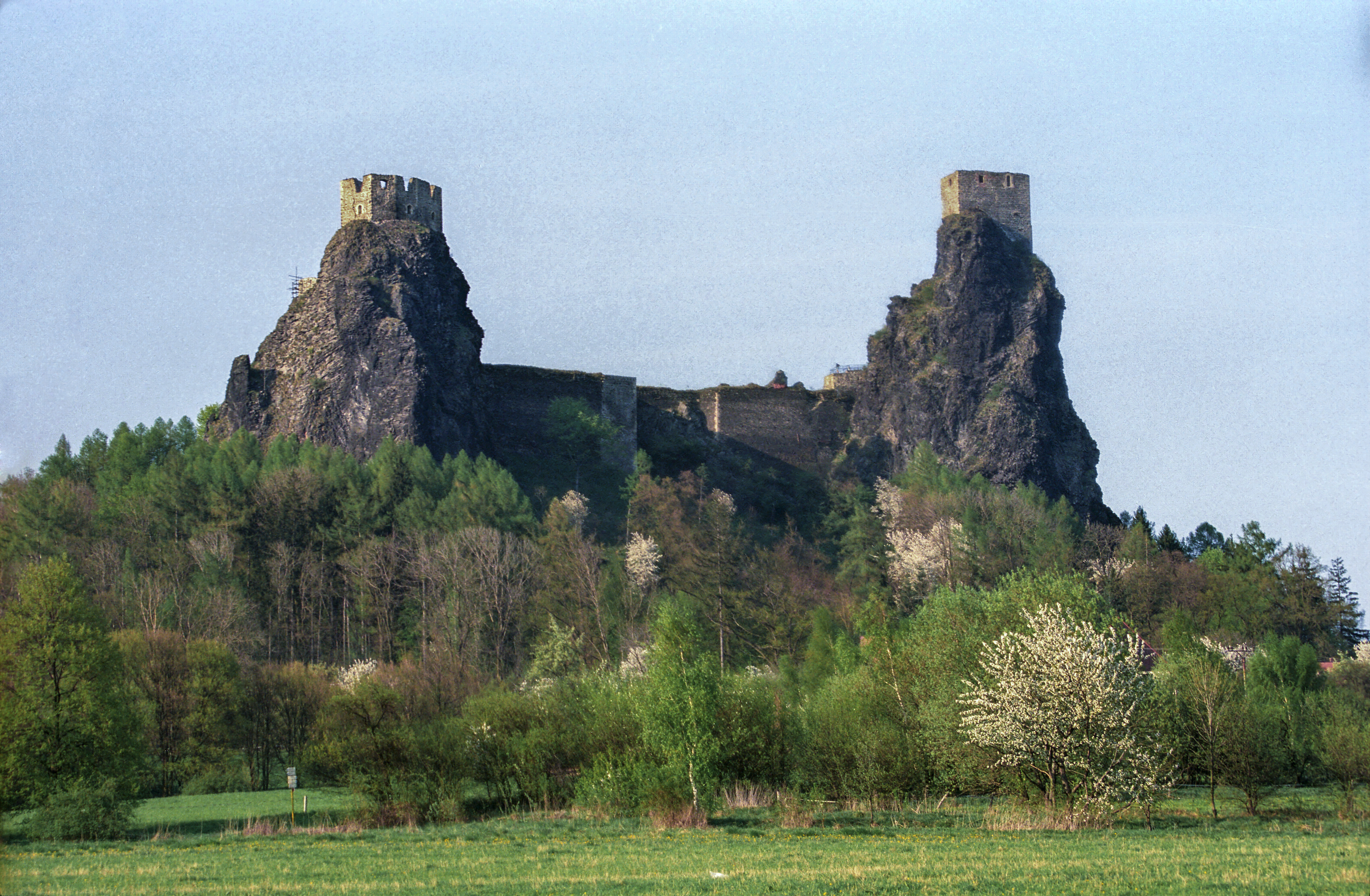 hrad Trosky, Český Ráj